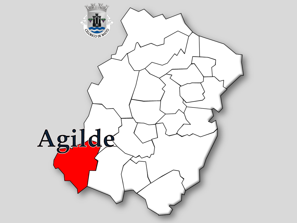 Censos 1864/2011